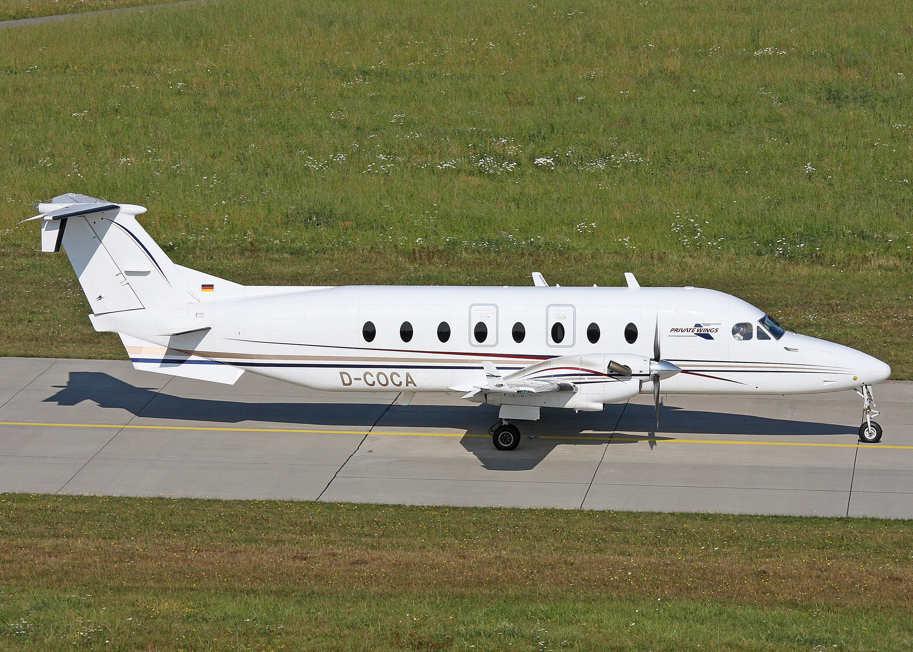 Haj / Eddv 20-09-08